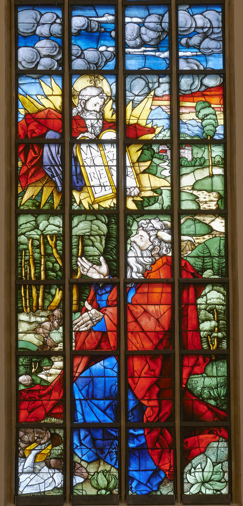 St. Jakob Straubing - Dürerfenster